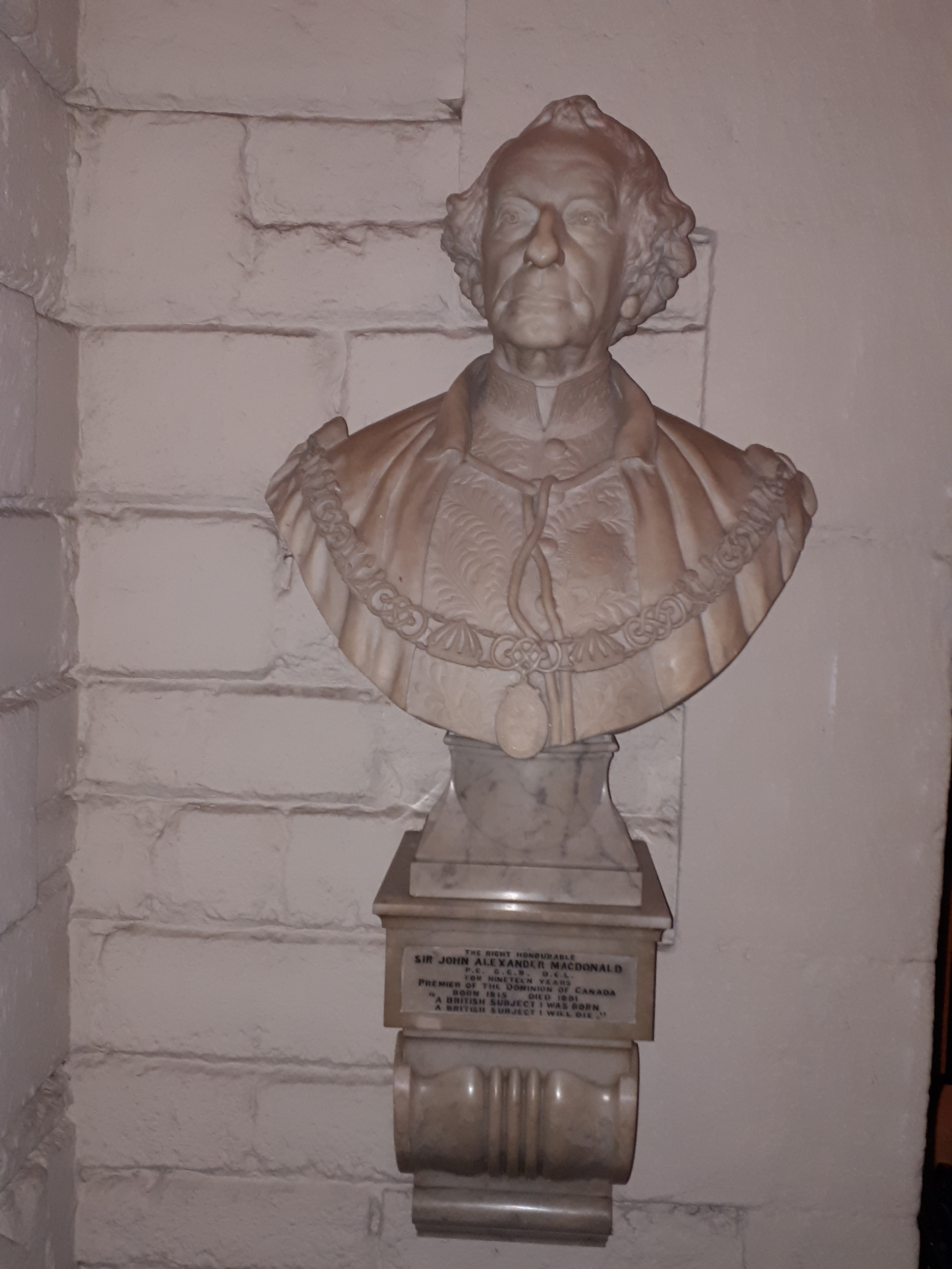 Bust of Sir John Alexander Macdonald, by George Edward Wade (1853-1933), at St. Paul's Cathedral crypt, London